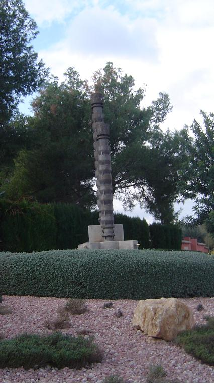 Font de Cavallers en la Avenida de las Delicias (L'Eliana)